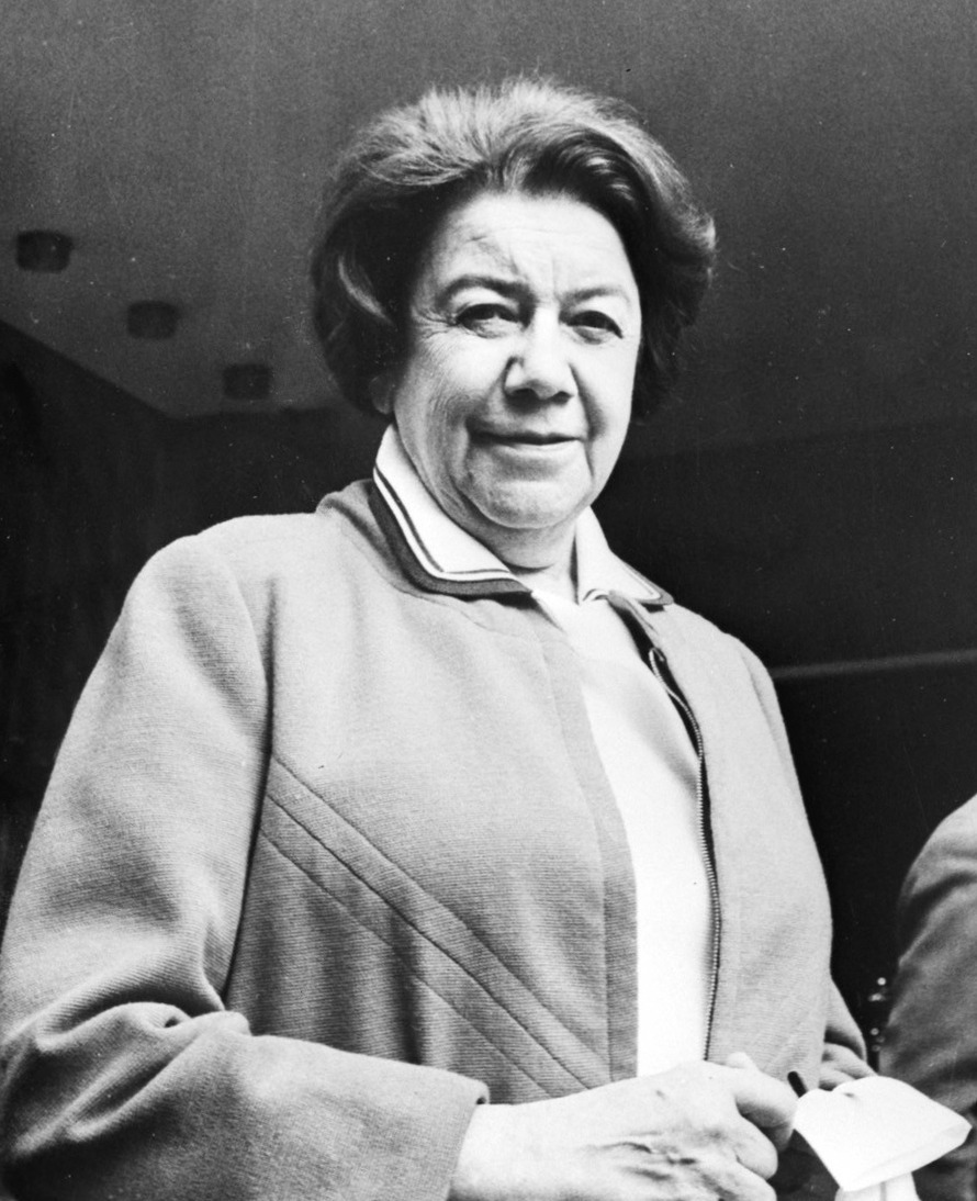 Roemeense "verjongingsspecialist" prof. dr. Ana Aslan in Wenen